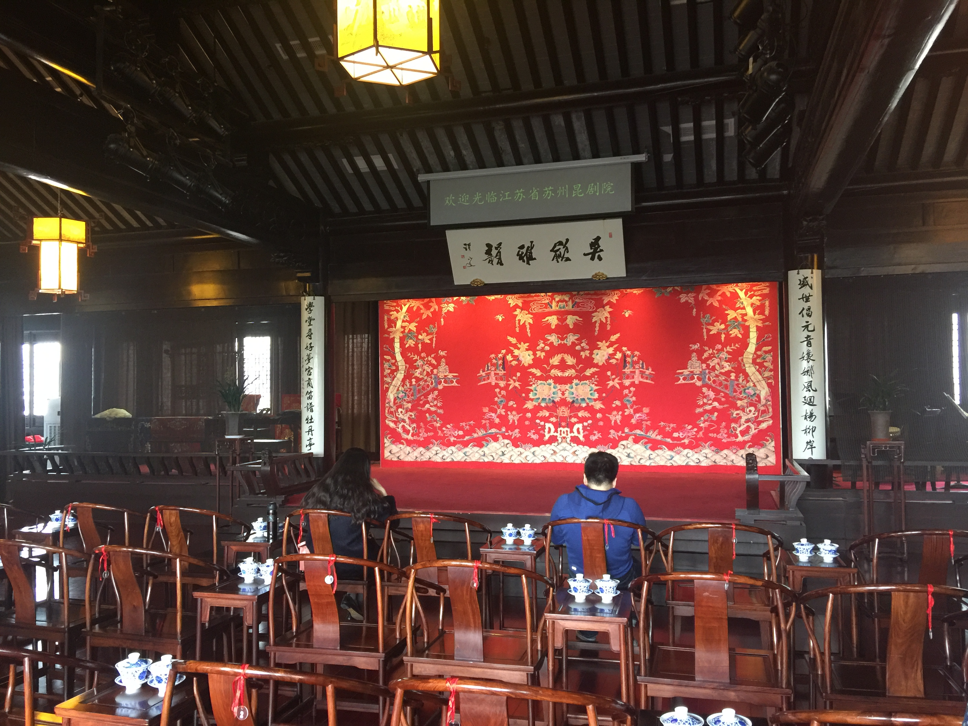 苏州昆剧院演出场地